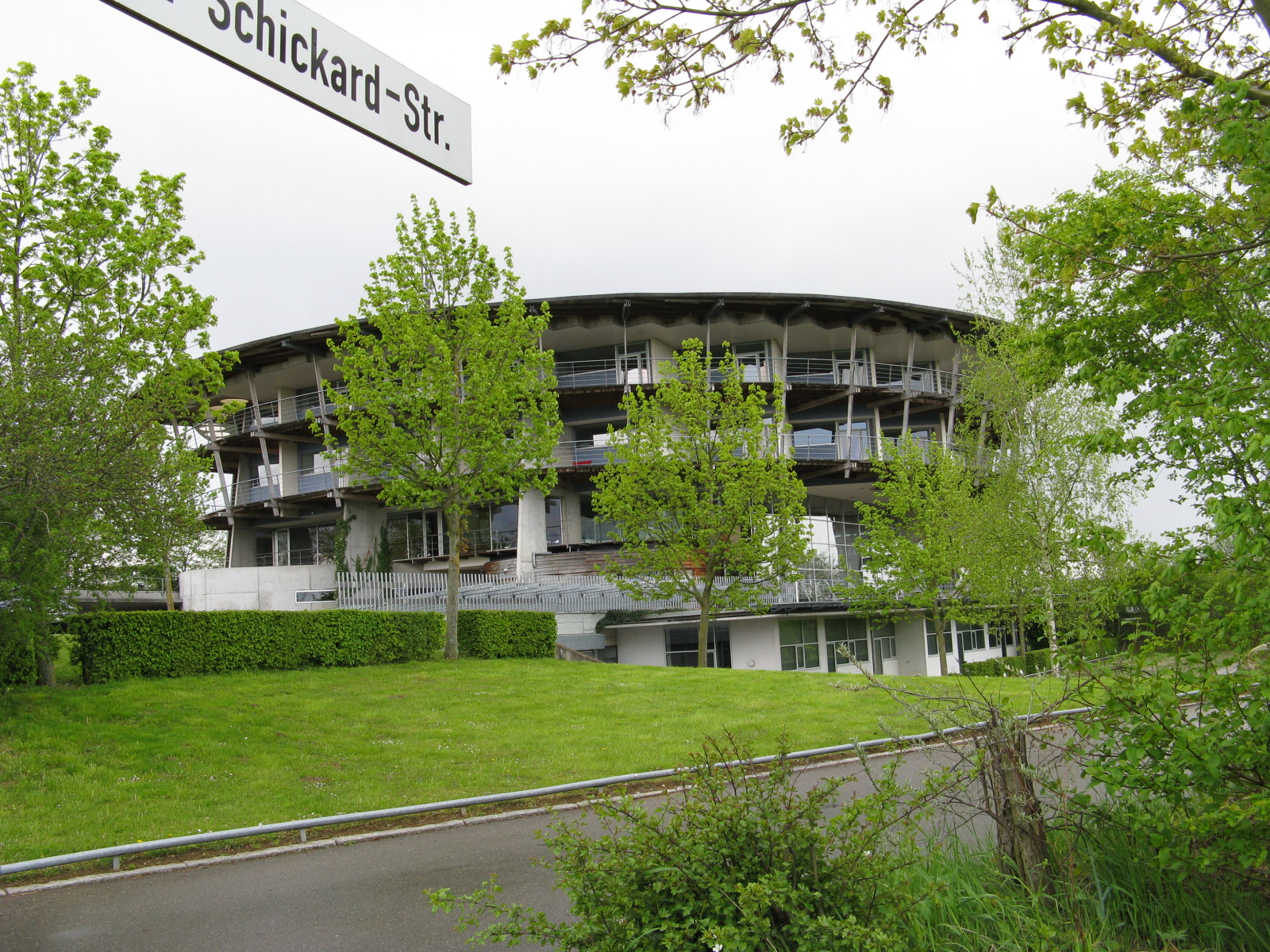 Gebäude der Data-Group in Pliezhausen-Gniebel (Wilhelm-Schickard-Straße 7)